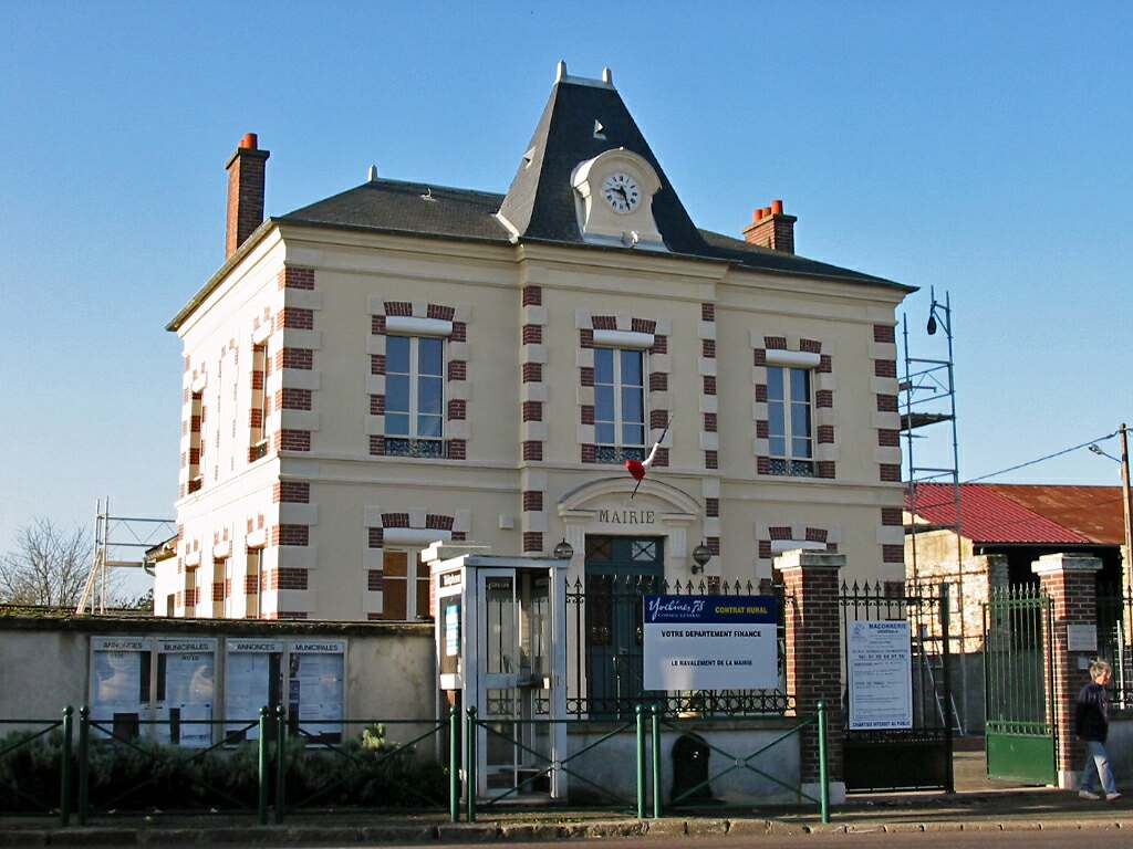 Mairie de Boinville-en-Mantois (Yvelines - France Photo JH Mora, nov. 2005